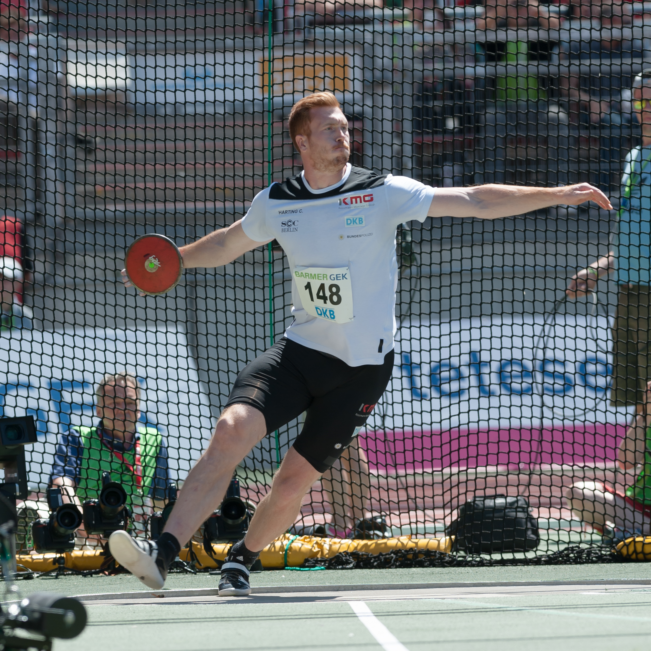 Deutsche Leichtathletik-Meisterschaften 2015: Männer Diskuswurf - Christoph Harting, SCC Berlin